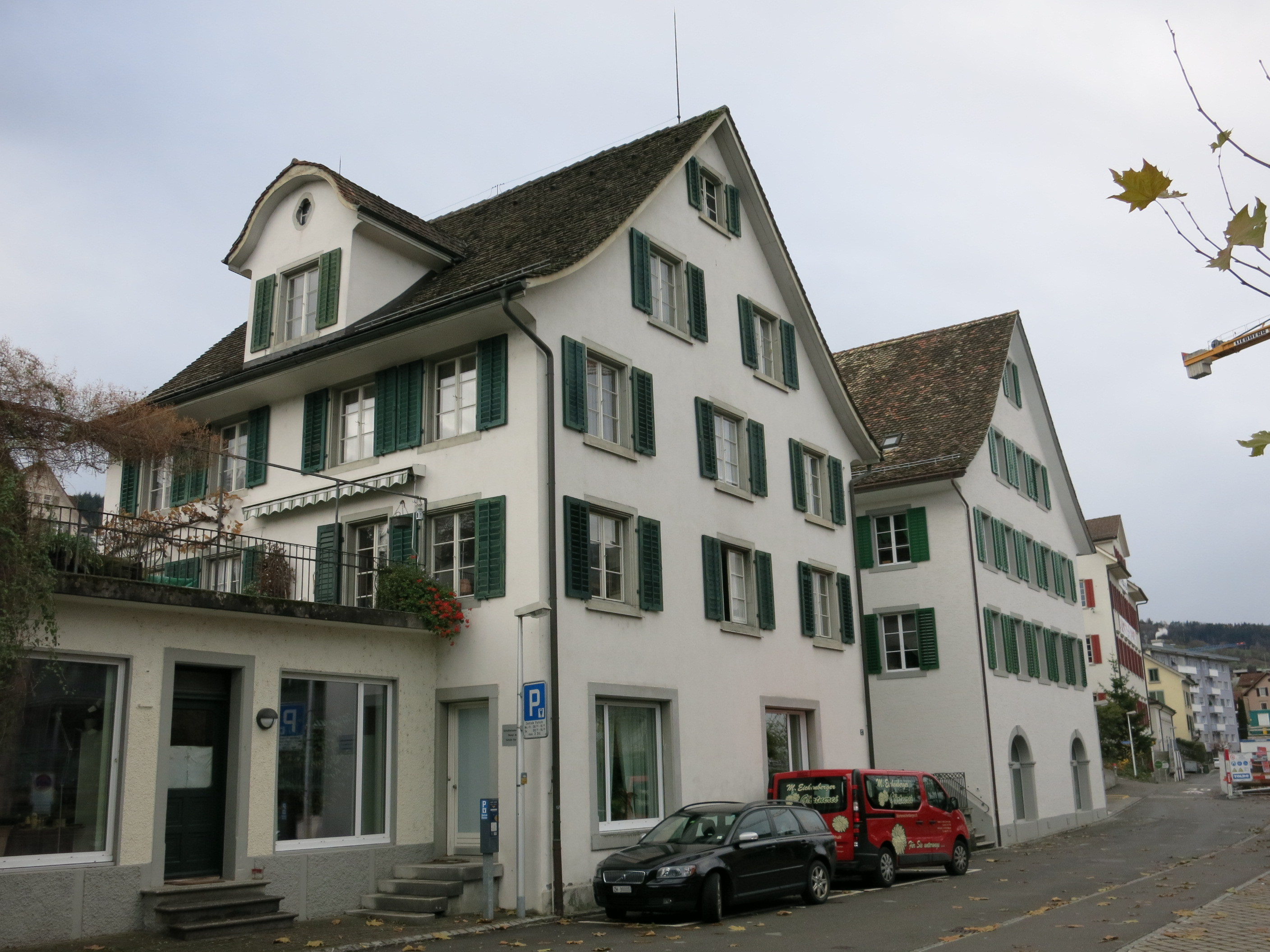 Lehrinstitut Gebrüder Hüni, Horgen ZH, Schweiz